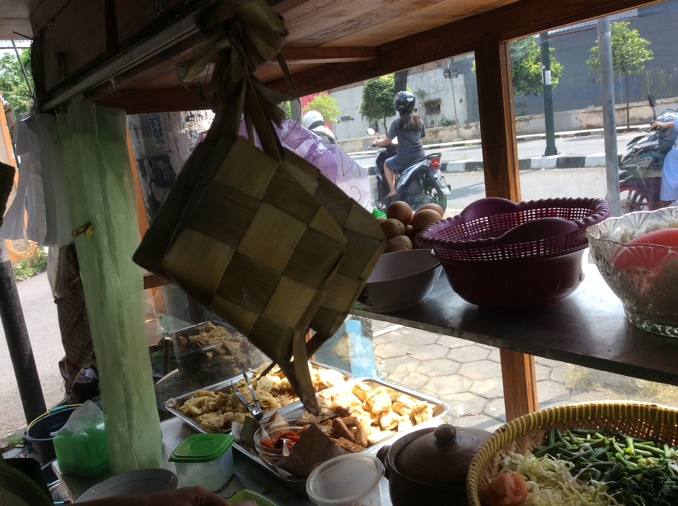 印尼米糕